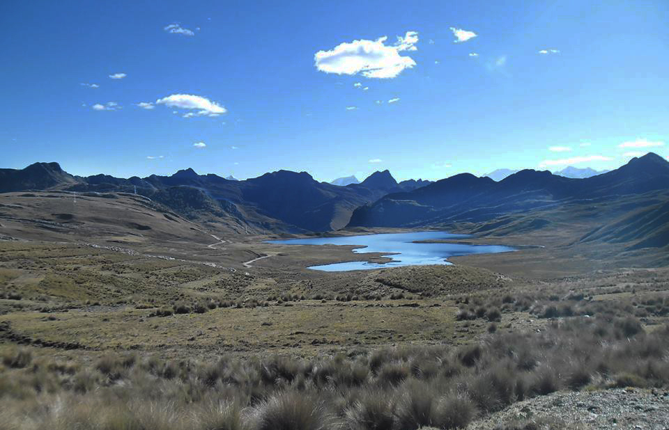 Laguna Huachucocha en las punas de Coyota - Provincia de Carlos F. Fitzcarrald. Al fondo se aprecian los nevados Copa, Hualcan, Huascaran, Contrahierbas a unos 32 km.